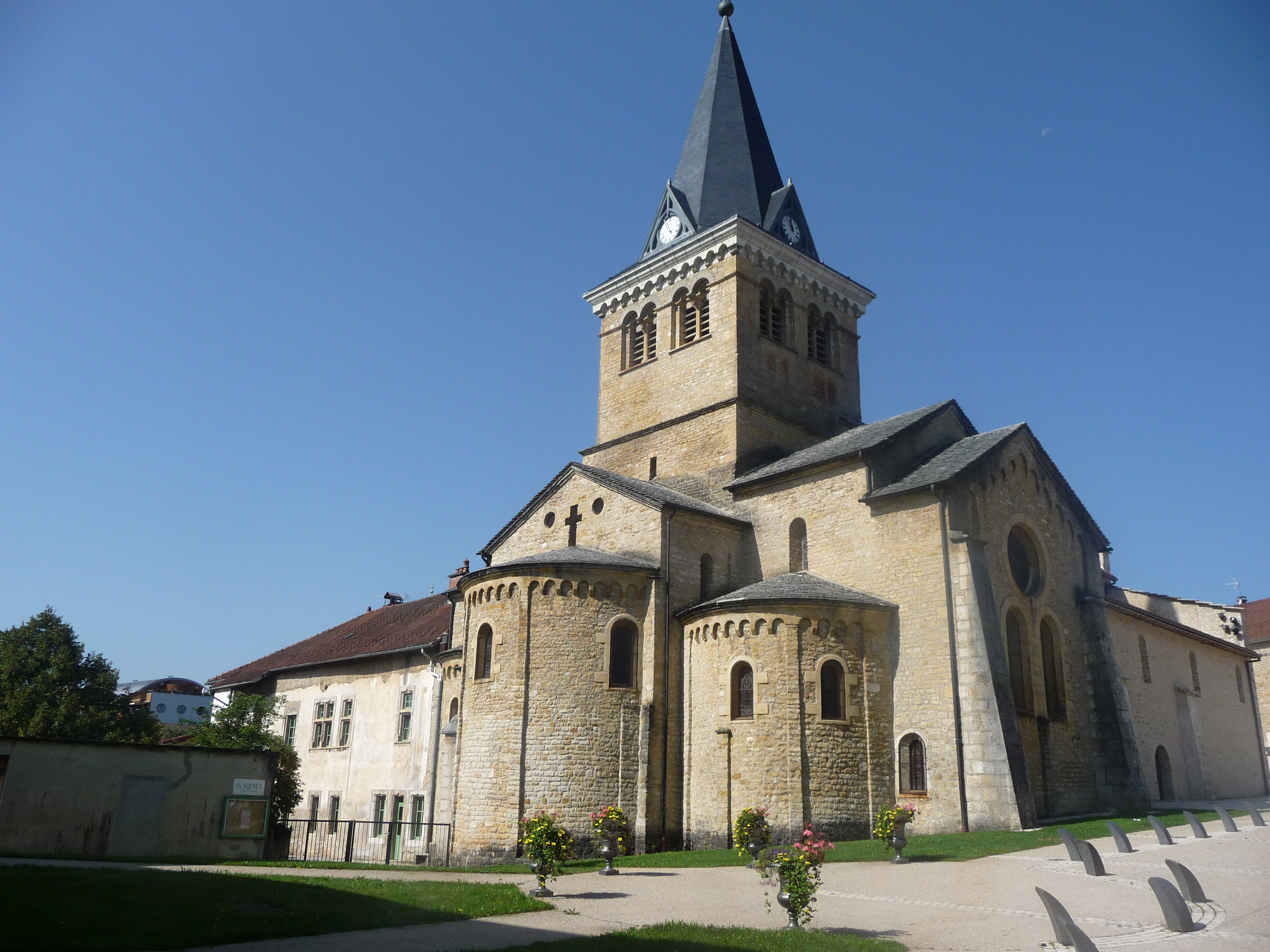 église sans doute du 12ème siècle